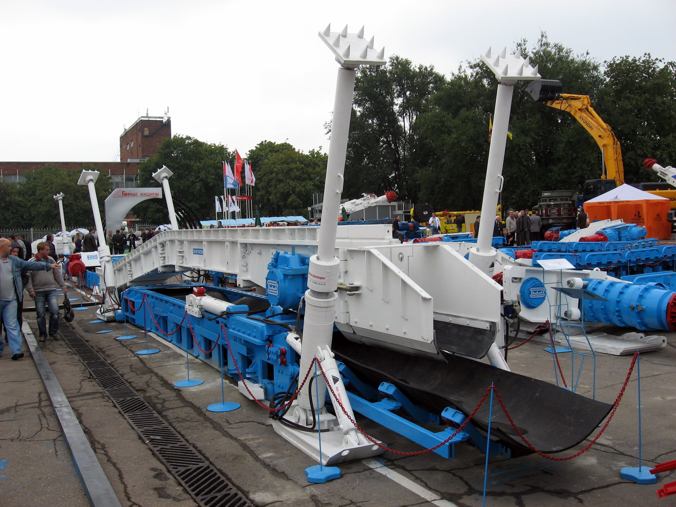 Фото з виставки Вугілля-Майнінг 2010